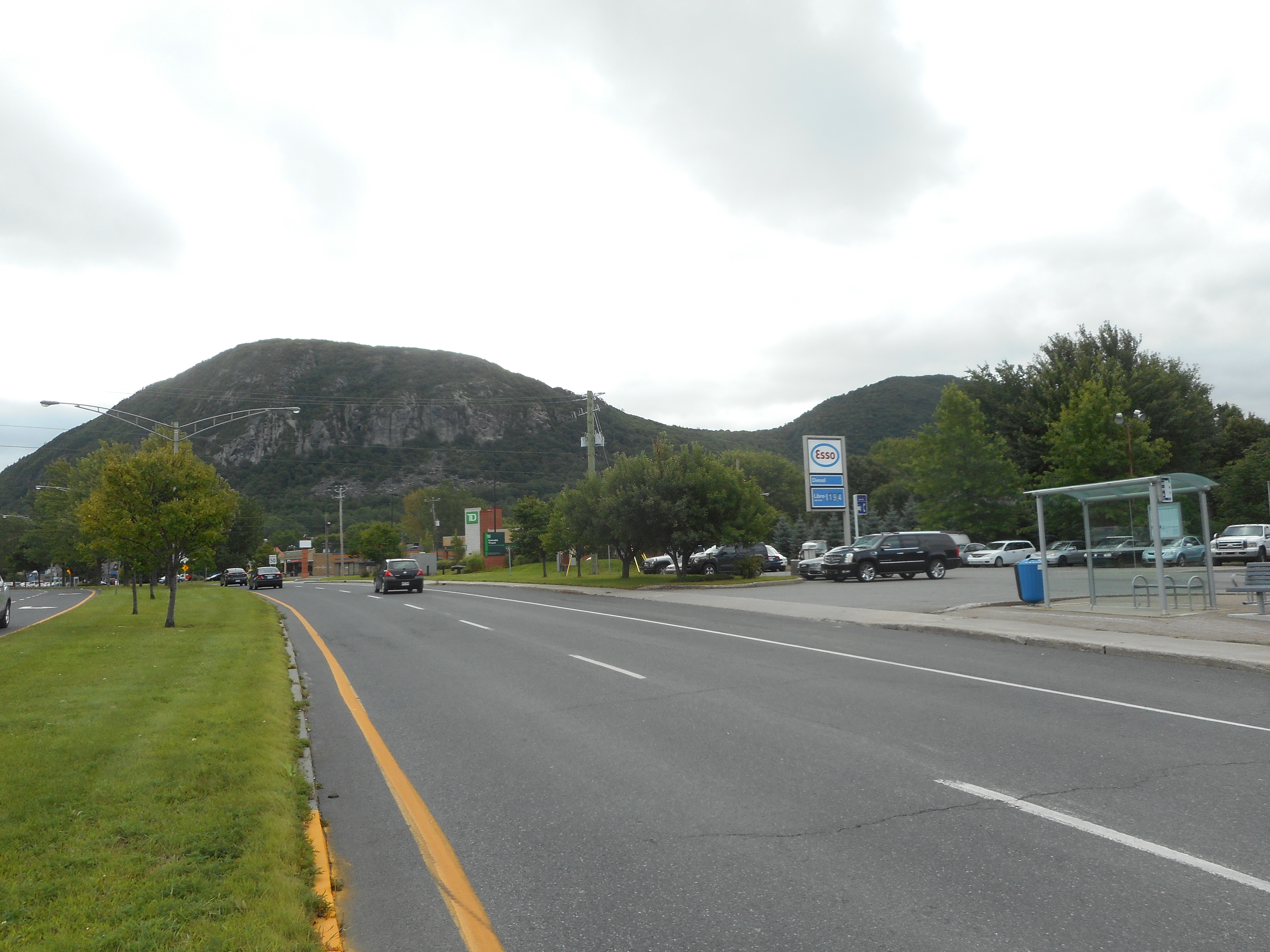 Mont Saint-Hilaire, vu du boulevard Sir-Wilfrid-Laurier (route 116)